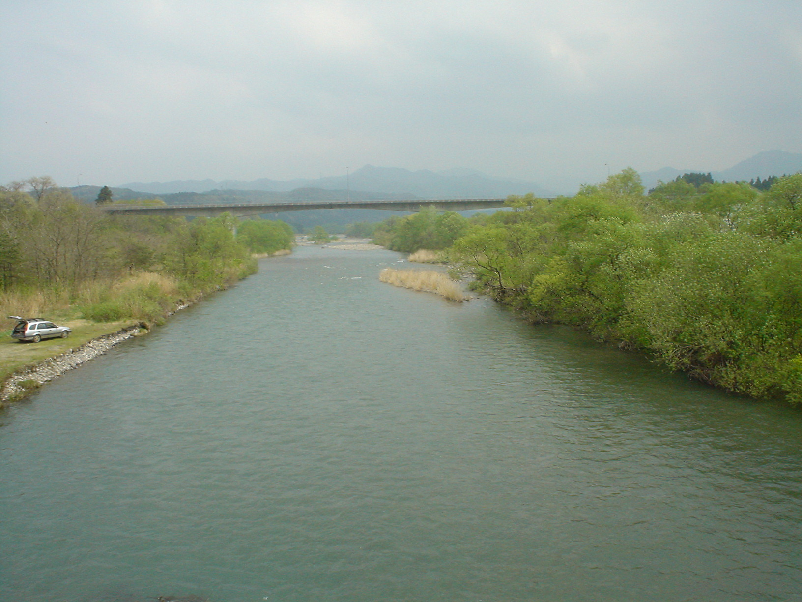 Tainai River in Niigata, Japan. ja: 胎内川（新潟県胎内市栗木野新田「胎内川橋」より上流の国道290号鼓岡大橋）